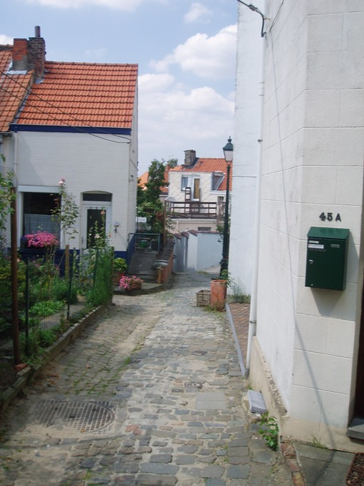 ancienne Chaussée de Tervueren Schietheyde Auderghem Belgium